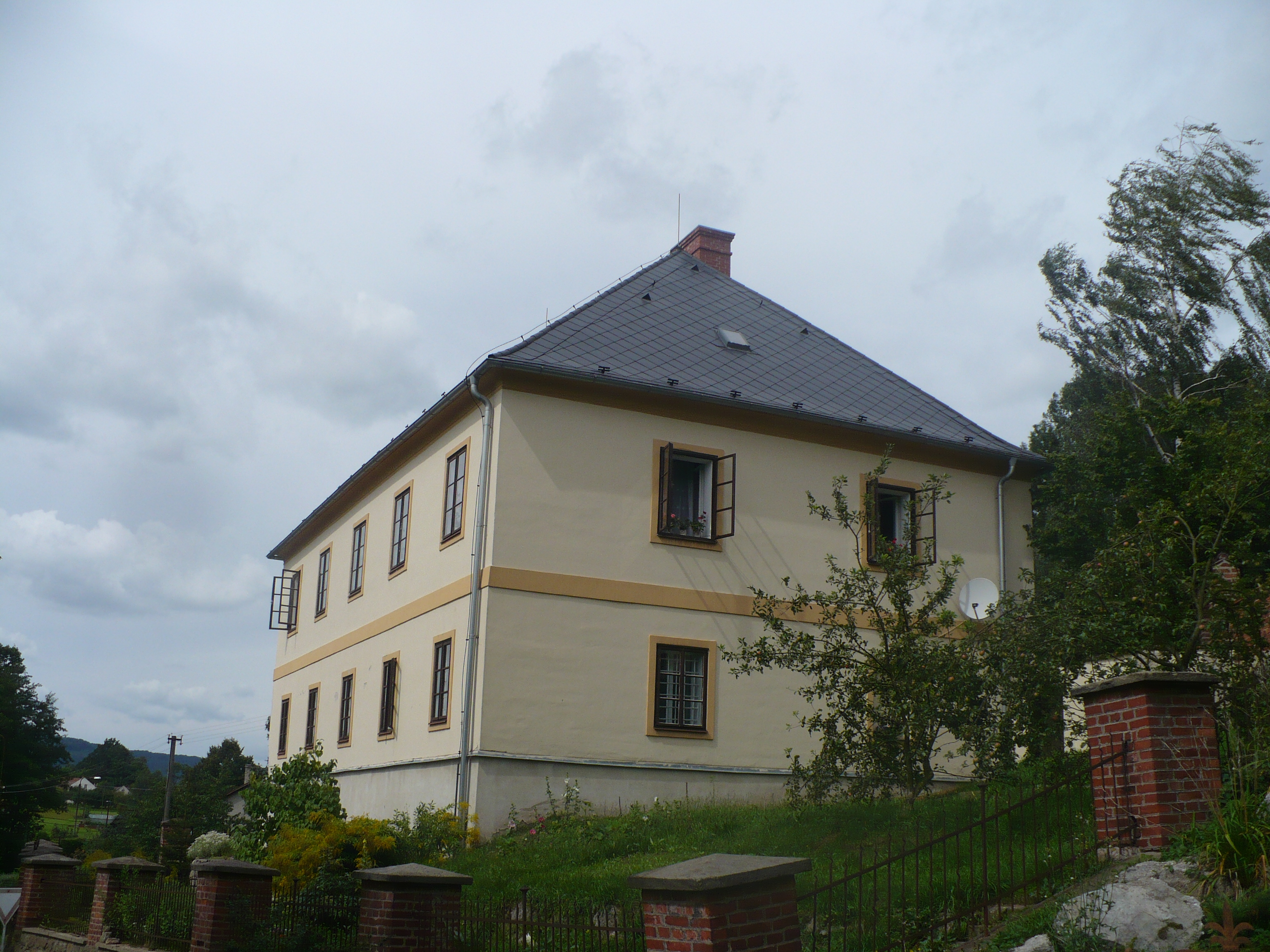 Rudoltice, fara